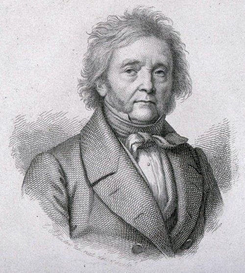 Auguste Lamey, mort à Strasbourg en 1861, Buste, face. Bibliothèque nationale et universitaire de Strasbourg